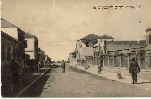 רחוב לילנבלום תל אביב Lilienblum St. Tel Aviv תל אביב 04 גימנסיה הרצליה 4